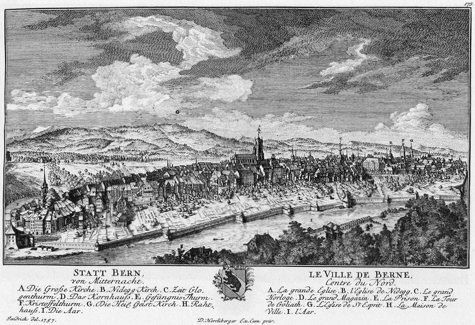 Ansicht der Stadt Bern 1757. Blatt 175 in der Topographie der Eidgenossenschaft, zweite Lieferung 1785–1762/63. Stich von David Herrliberger nach einer Zeichnung von Theodor Andreas Jendrich